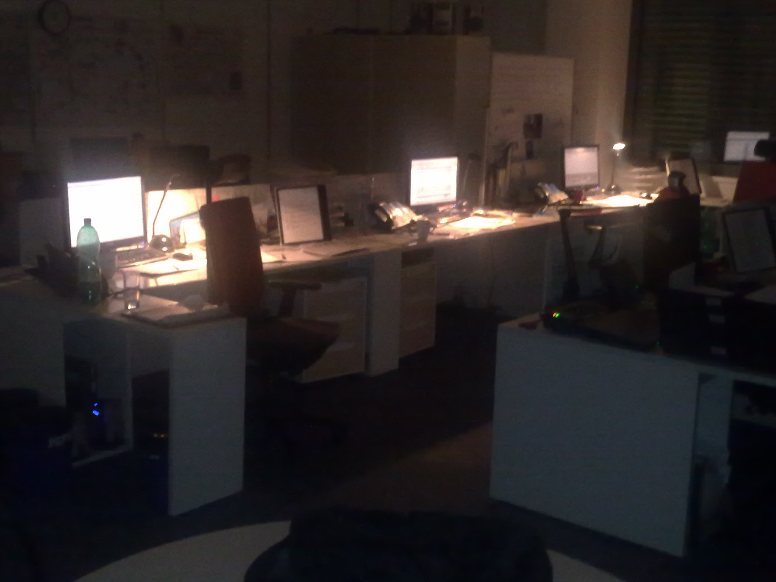 Noční atmosféra ostravského dispečinku AWT